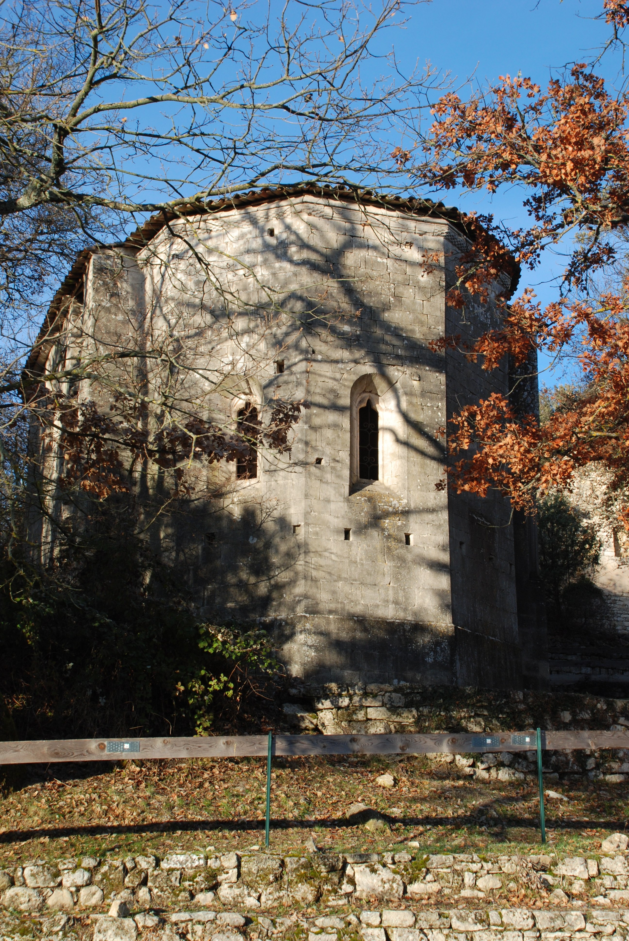 France - Provence - Prieuré de Carluc